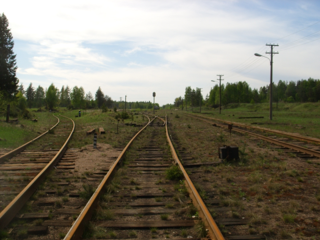 Ст.Вещево